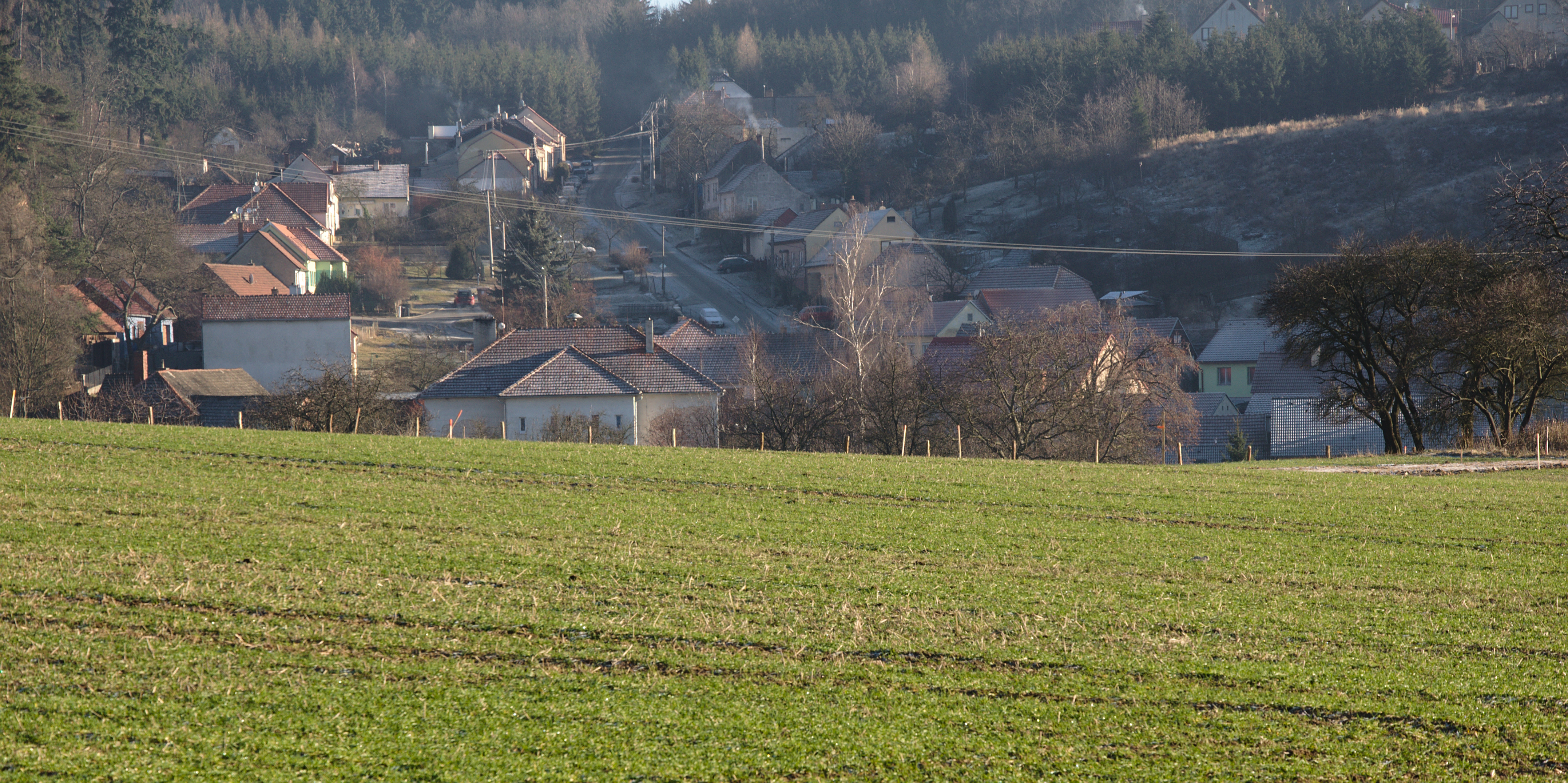 Pohled na obec od západu, Kuničky, okres Blansko